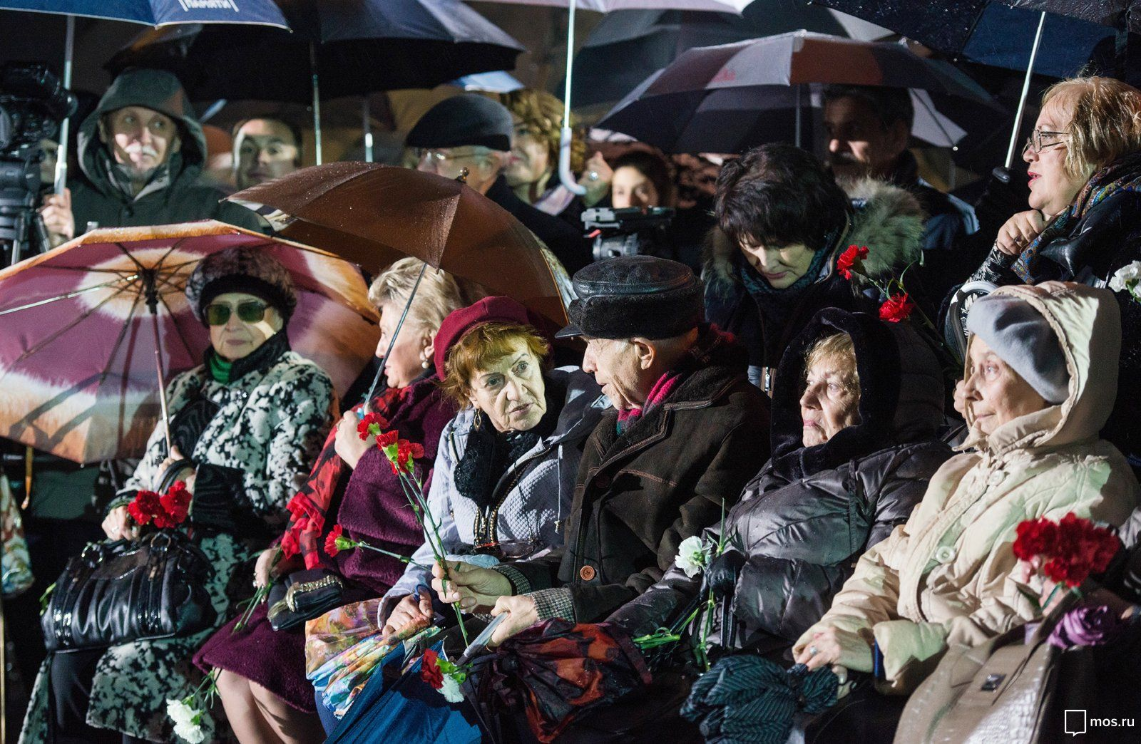 Открытие мемориала «Стена скорби»